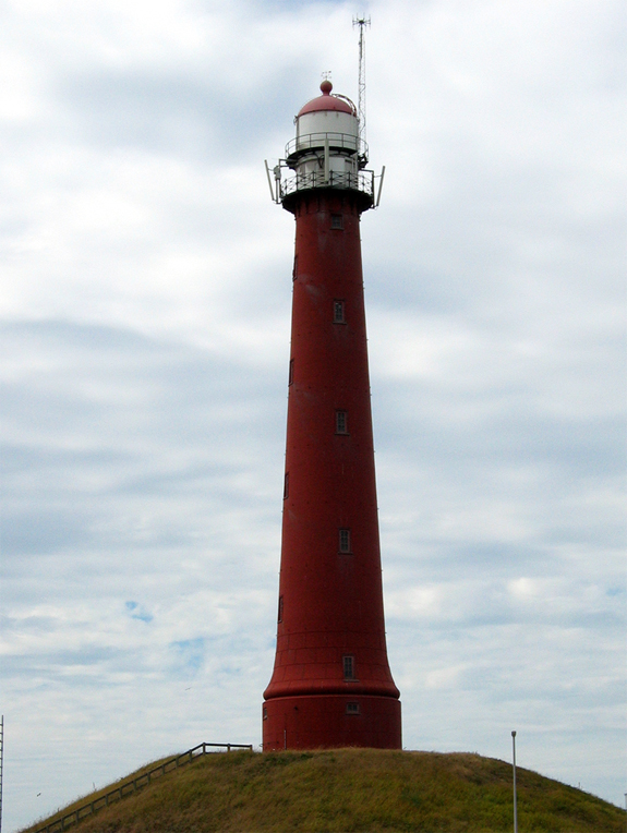 De grote vuurtoren van IJmuiden